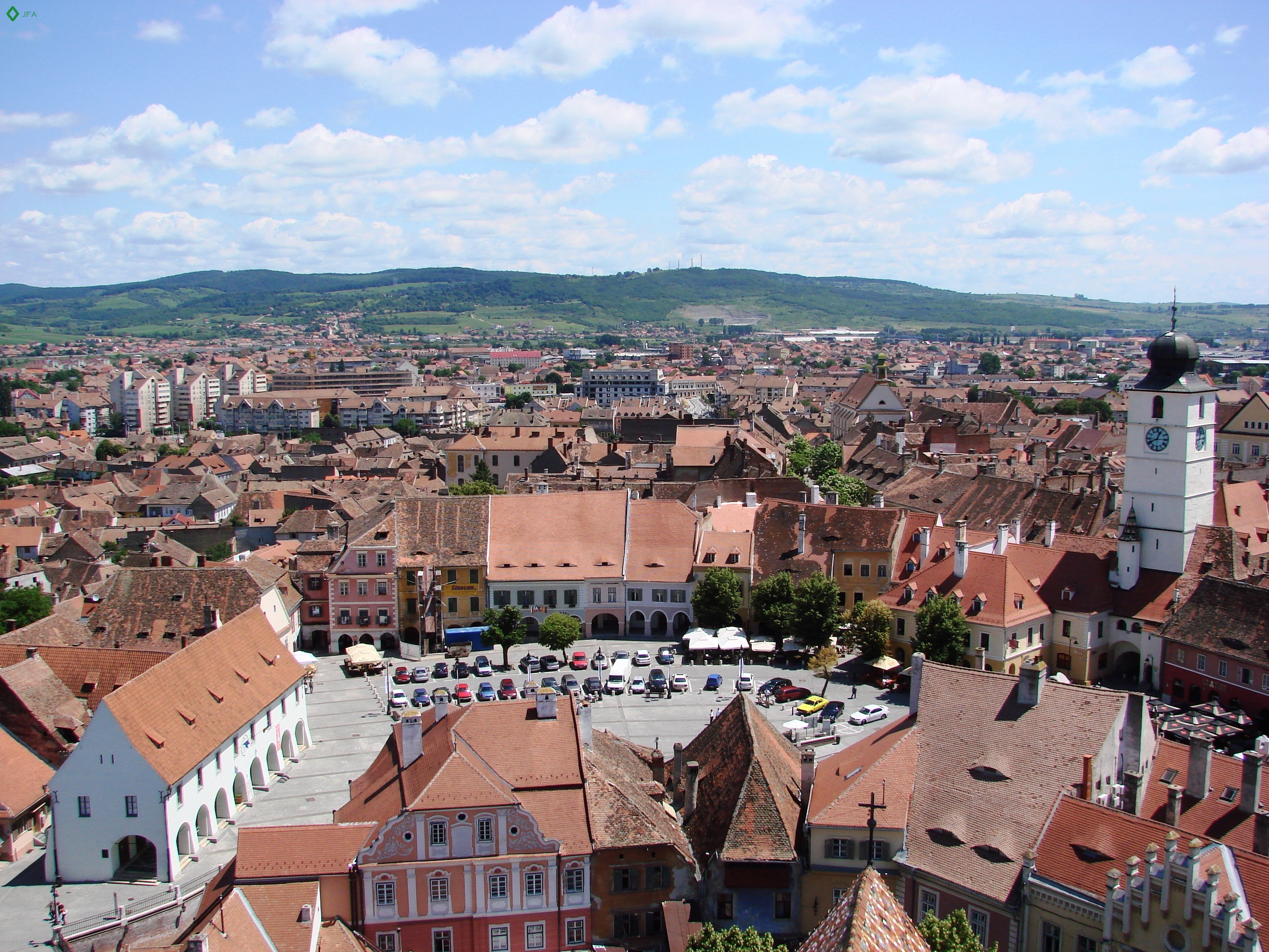 Sibiu (Piaţa Mică), 14 juin 2011